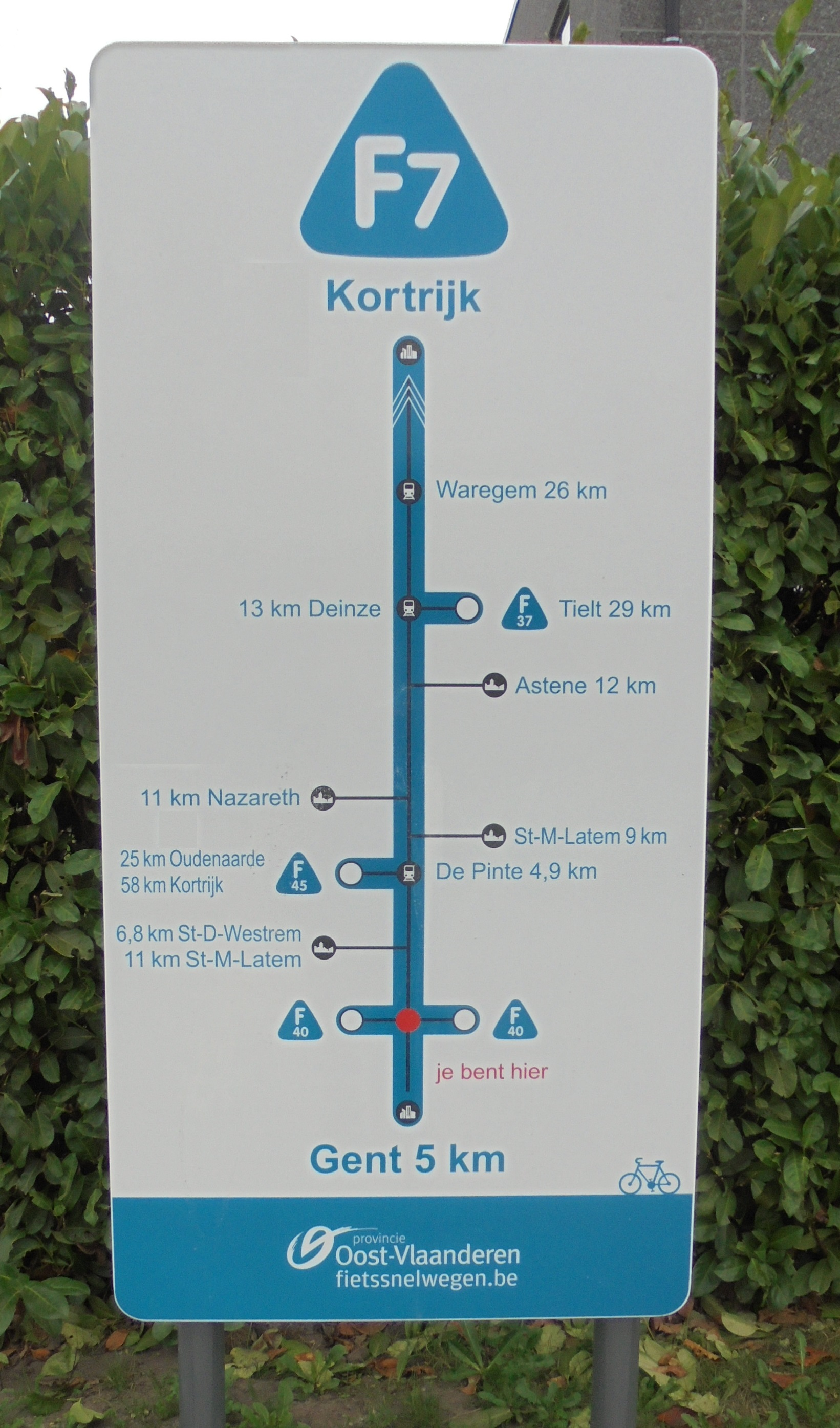 Wegwijzer - De Pintelaan - Gent - Oost-Vlaanderen - België